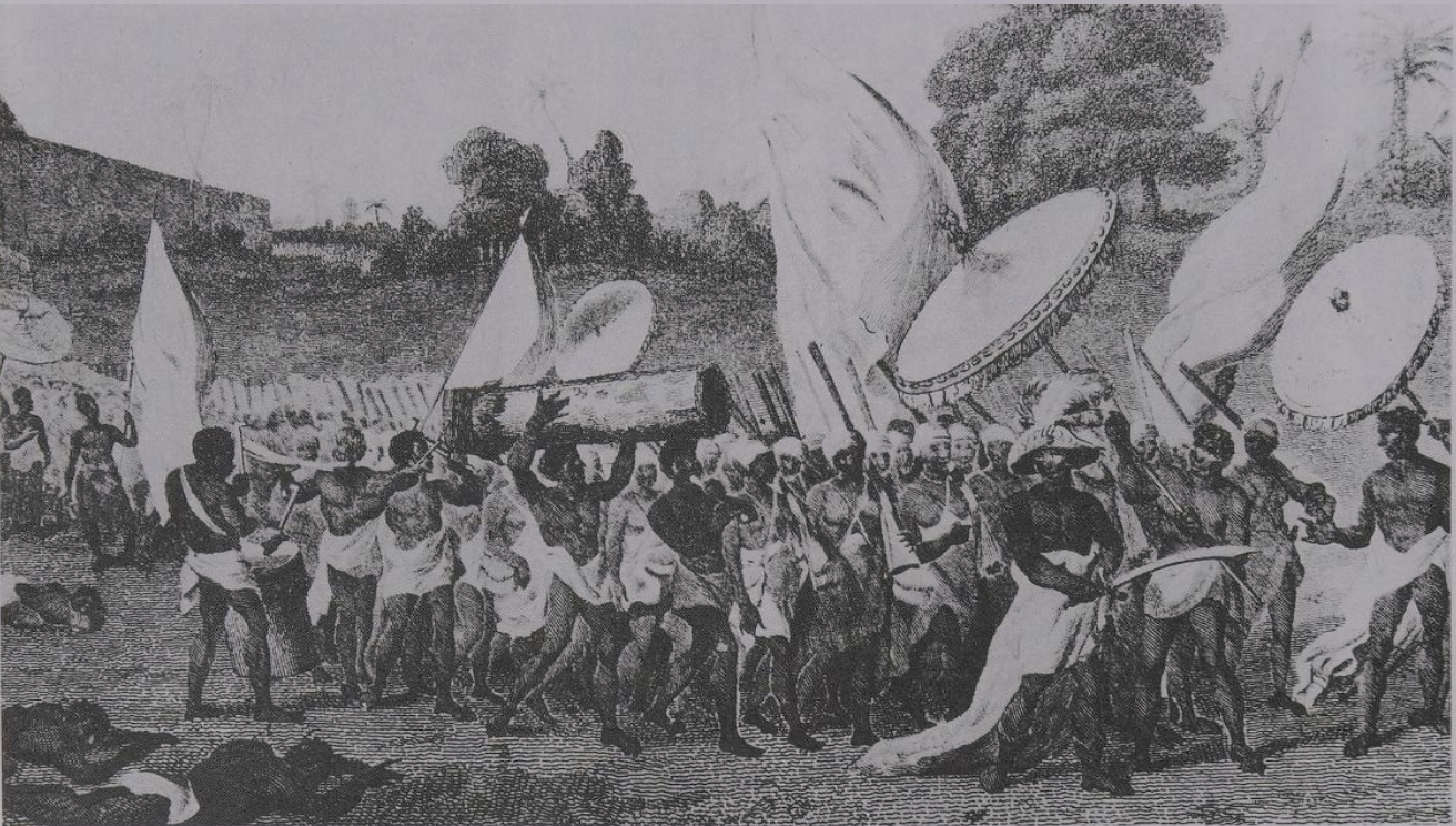 Illustrasjon fra Archibald Dalziels bok The history of Dahomey